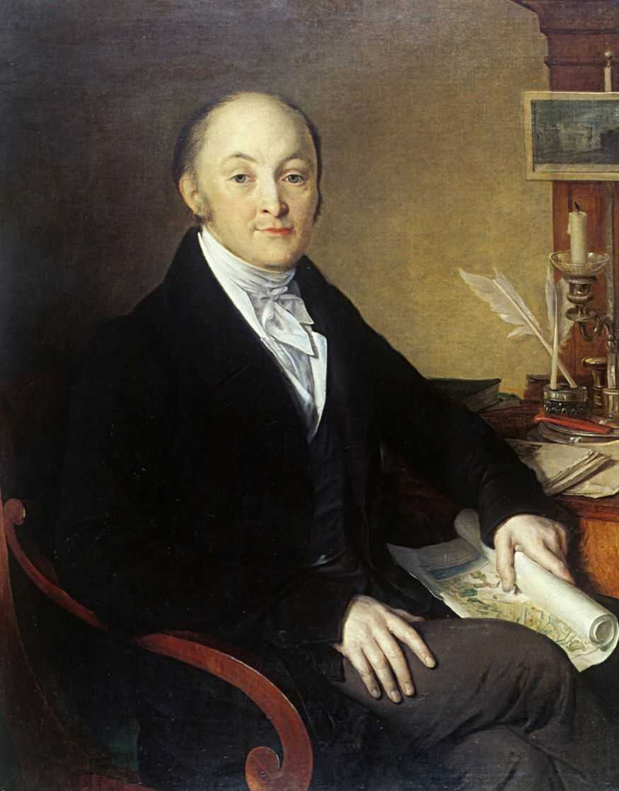 Михаил Михайлович Сперанский (1 (12) января 1772 — 11 (23) февраля 1839) — общественный и государственный деятель времён Александра I и Николая I, реформатор и законотворец.